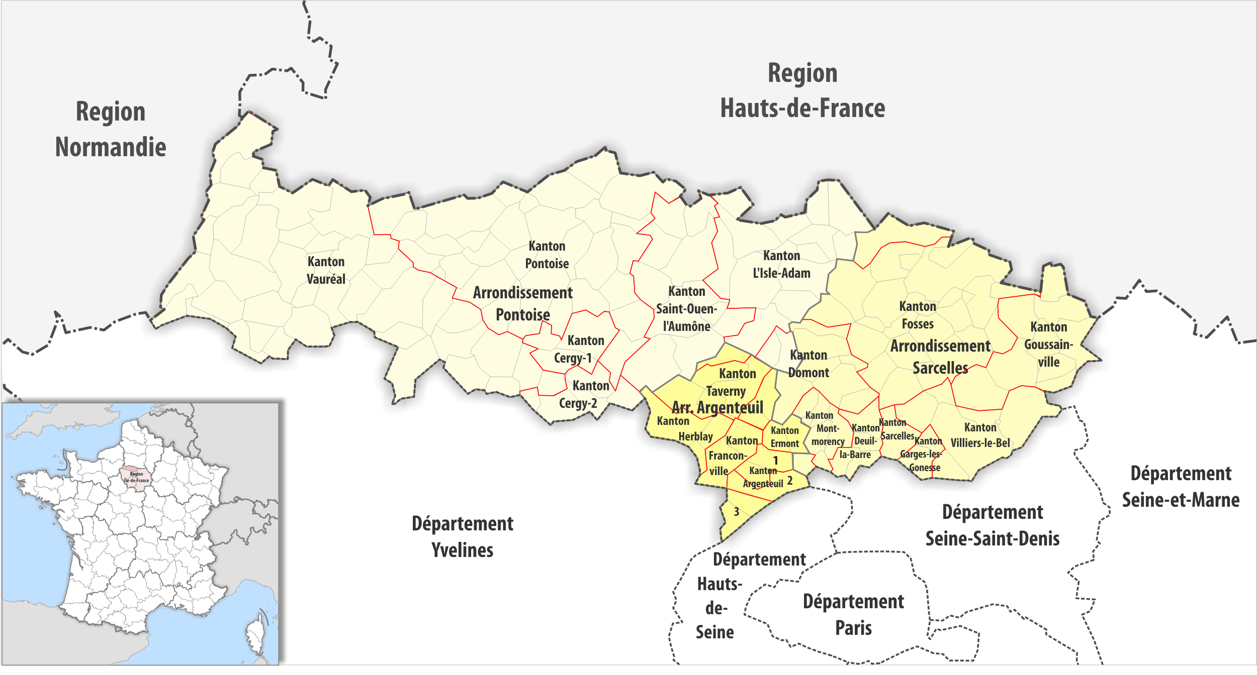 Gemeinden, Kantone und Arrondissemente im Departement Val-d’Oise